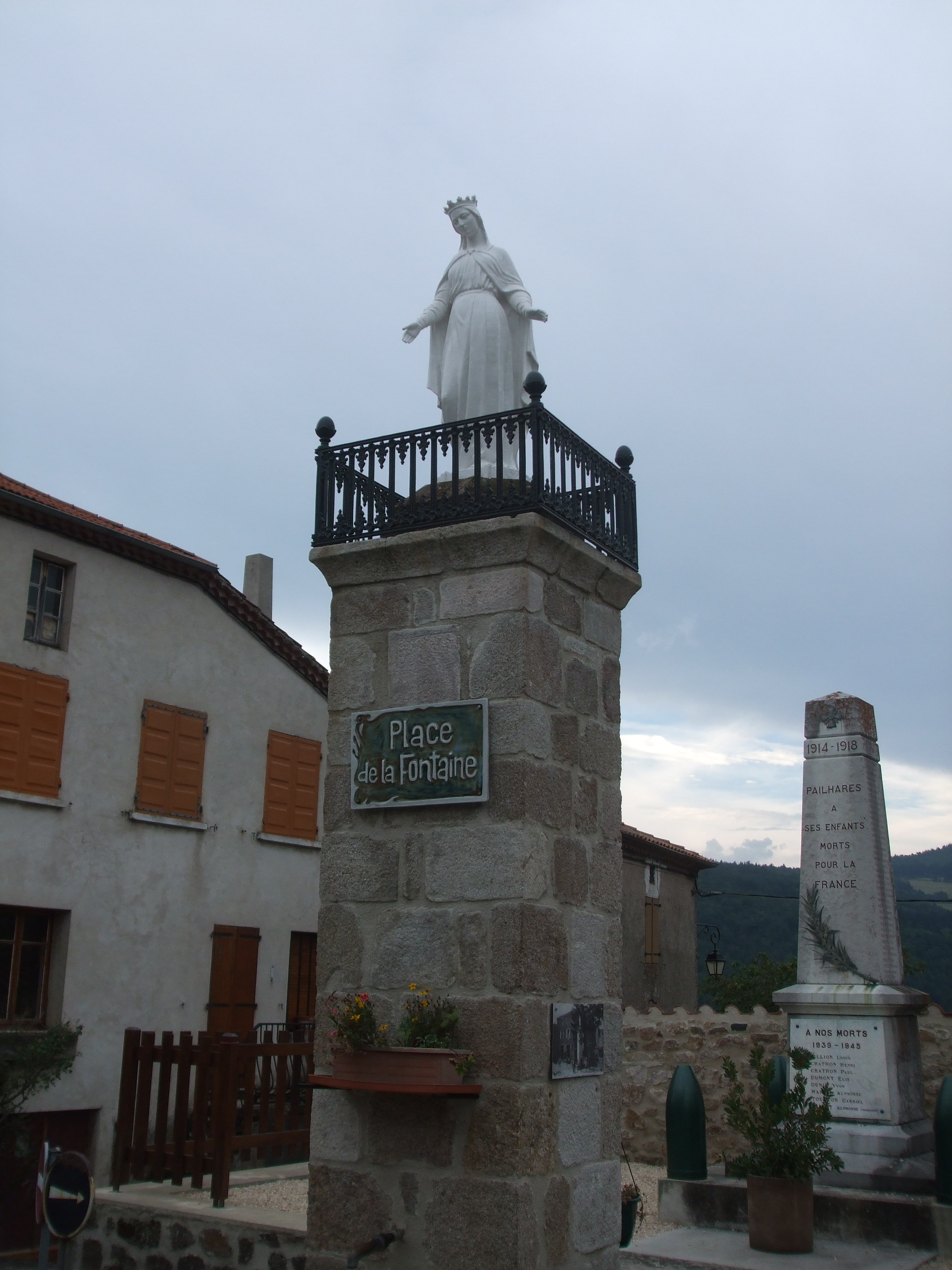 Pailharès (Ardèche) - Vierge de la fontaine